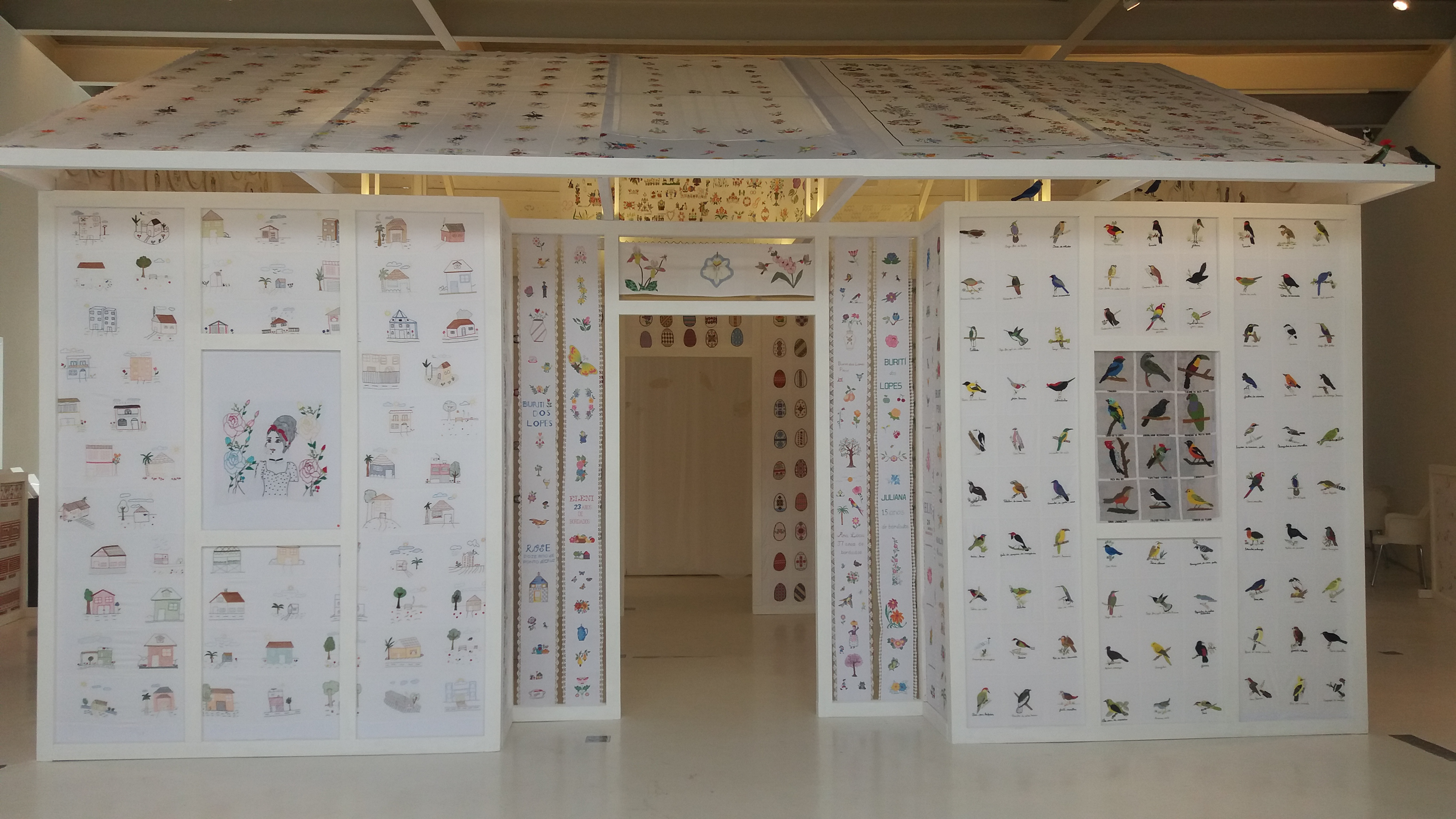 Vista de frente de uma das exposições realizada no museu. (exposição "A Casa Bordada")